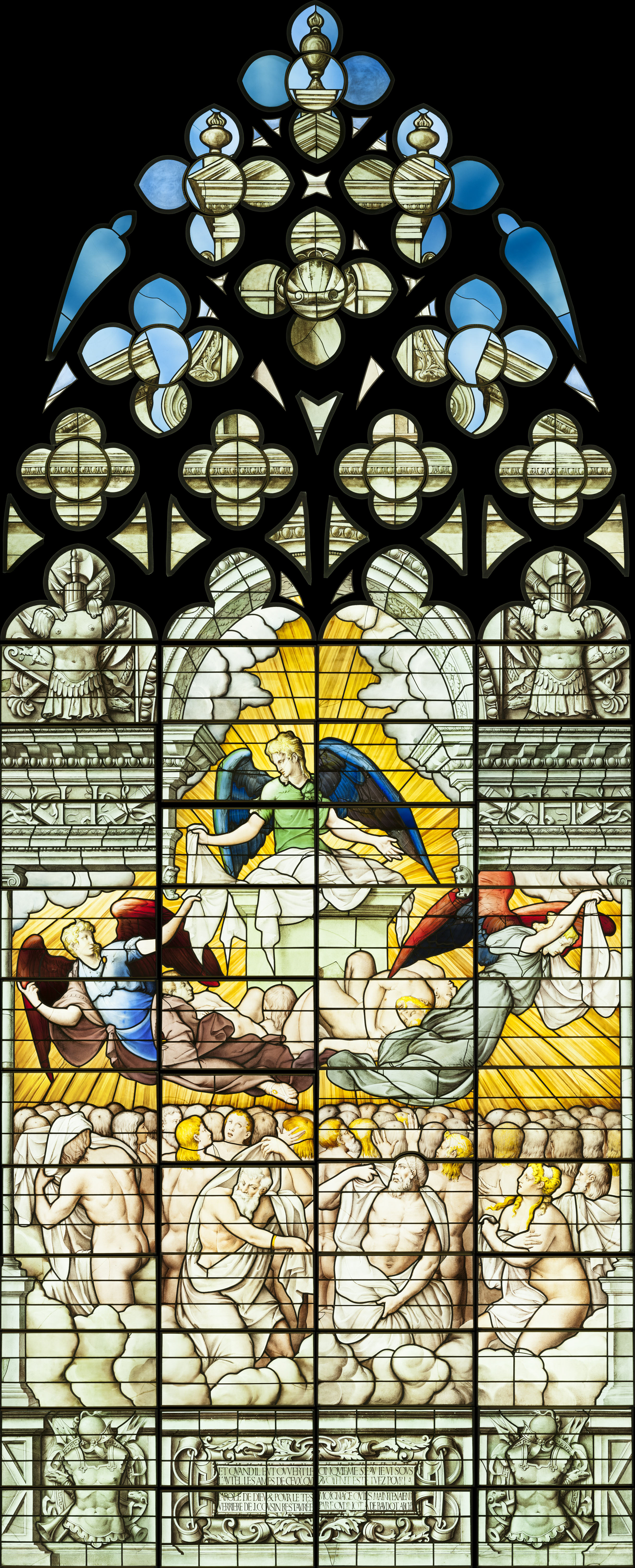 Panneau du registre supérieur de la baie 5 du choeur.